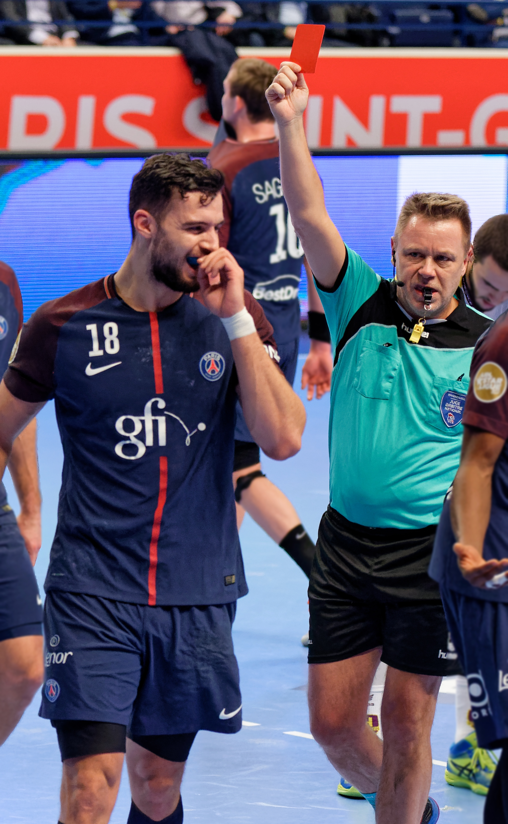 Nedim Remili est suspendu définitivement en recevant un carton rouge lors du match de Coupe de la Ligue entre le PSG Handball et le HBC Nantes. À Coubertin, le 14 décembre 2017.